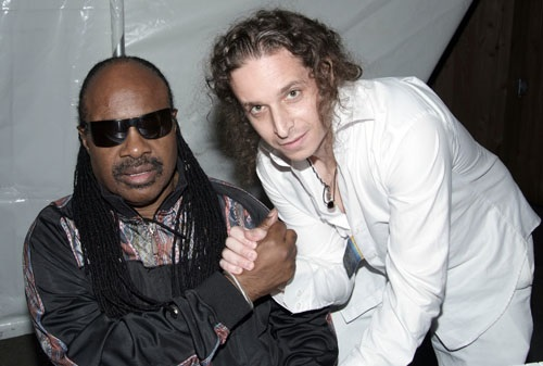 aa Stevland and me 2 1